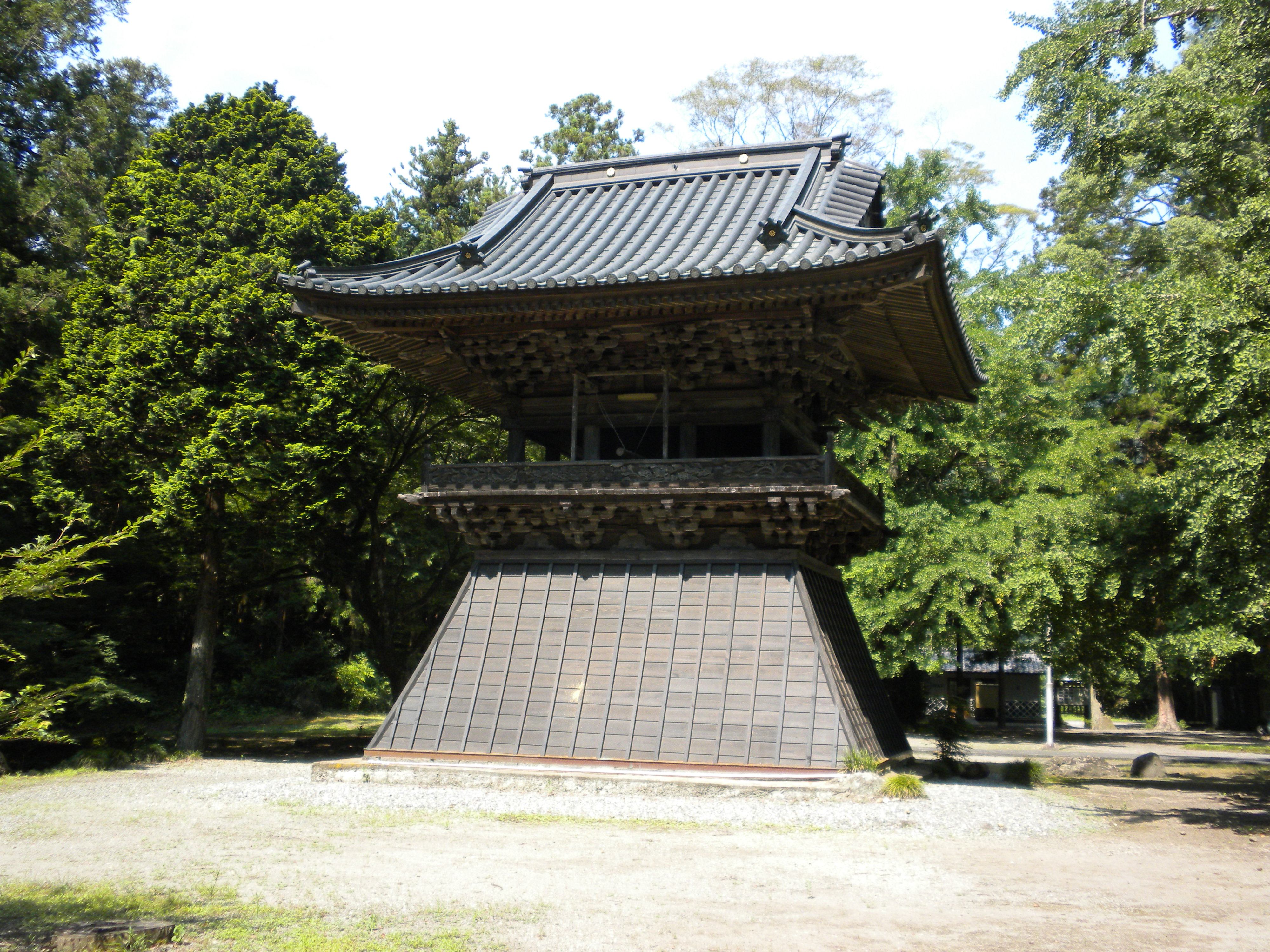 西山本門寺の鐘楼（静岡県富士宮市）